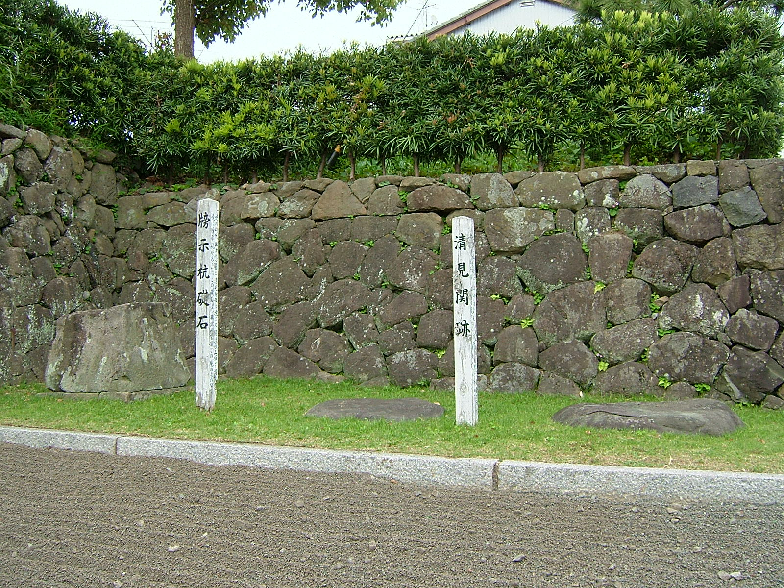 清見関跡碑（清見寺境内）